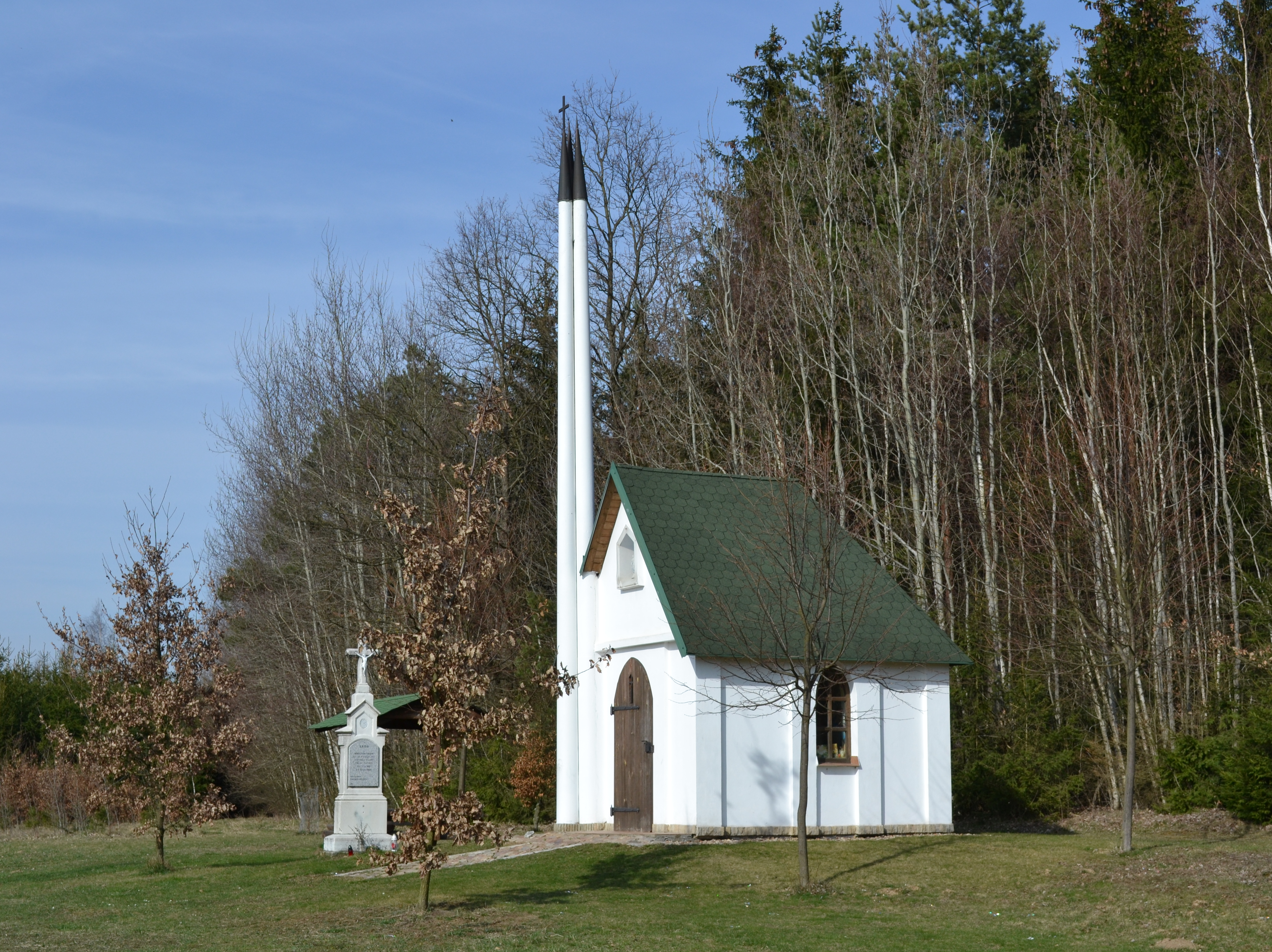 Střítež (okres Jihlava) - kaple Panny Marie u Antonínova Dolu.